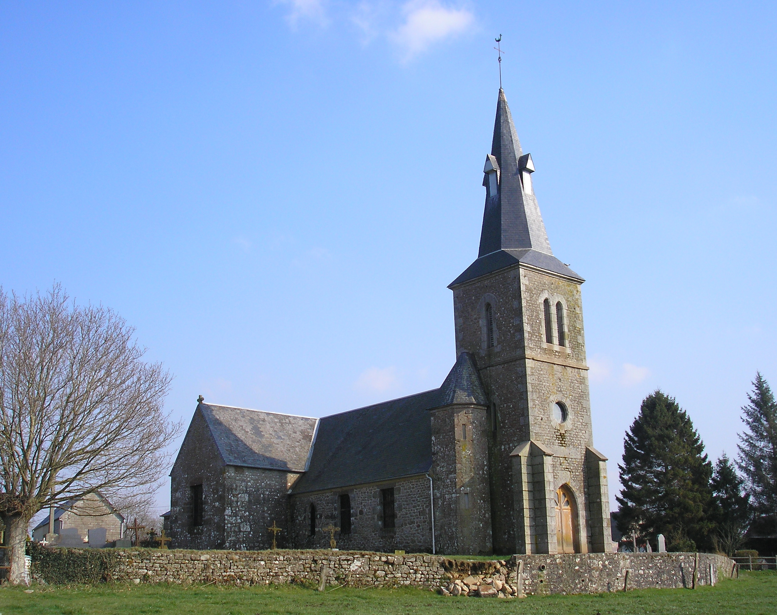 Saint-Germain-de-Tallevende-la-Lande-Vaumont (Normandie, France). L'église de La Lande-Vaumont.